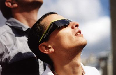 Les observateurs de l'éclipse du 11 août 1999 se sont vus fortement recommander l'utilisation de lunettes spéciales, distribuées notamment par les kiosques à journaux, pour observer le phénomène (photo sous licence GFDL).